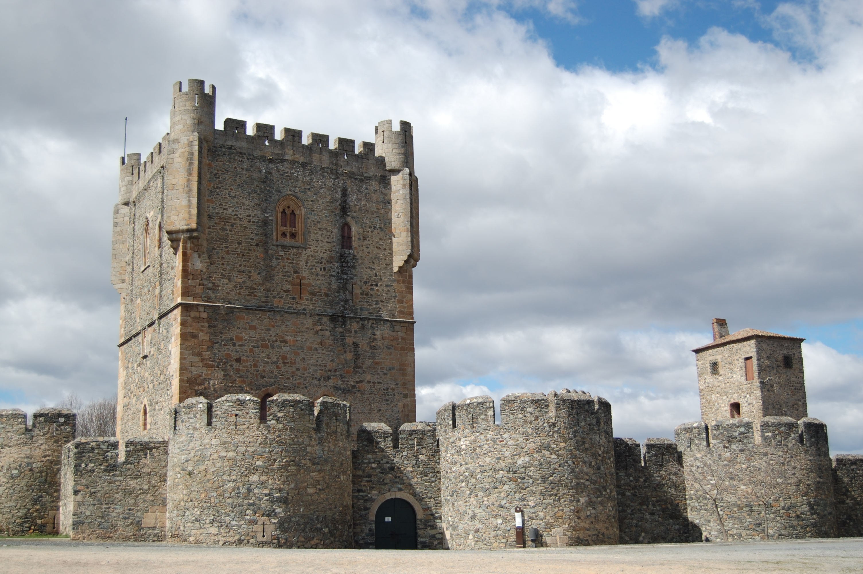 El Castillo de Bragança, al noreste de Portugal.